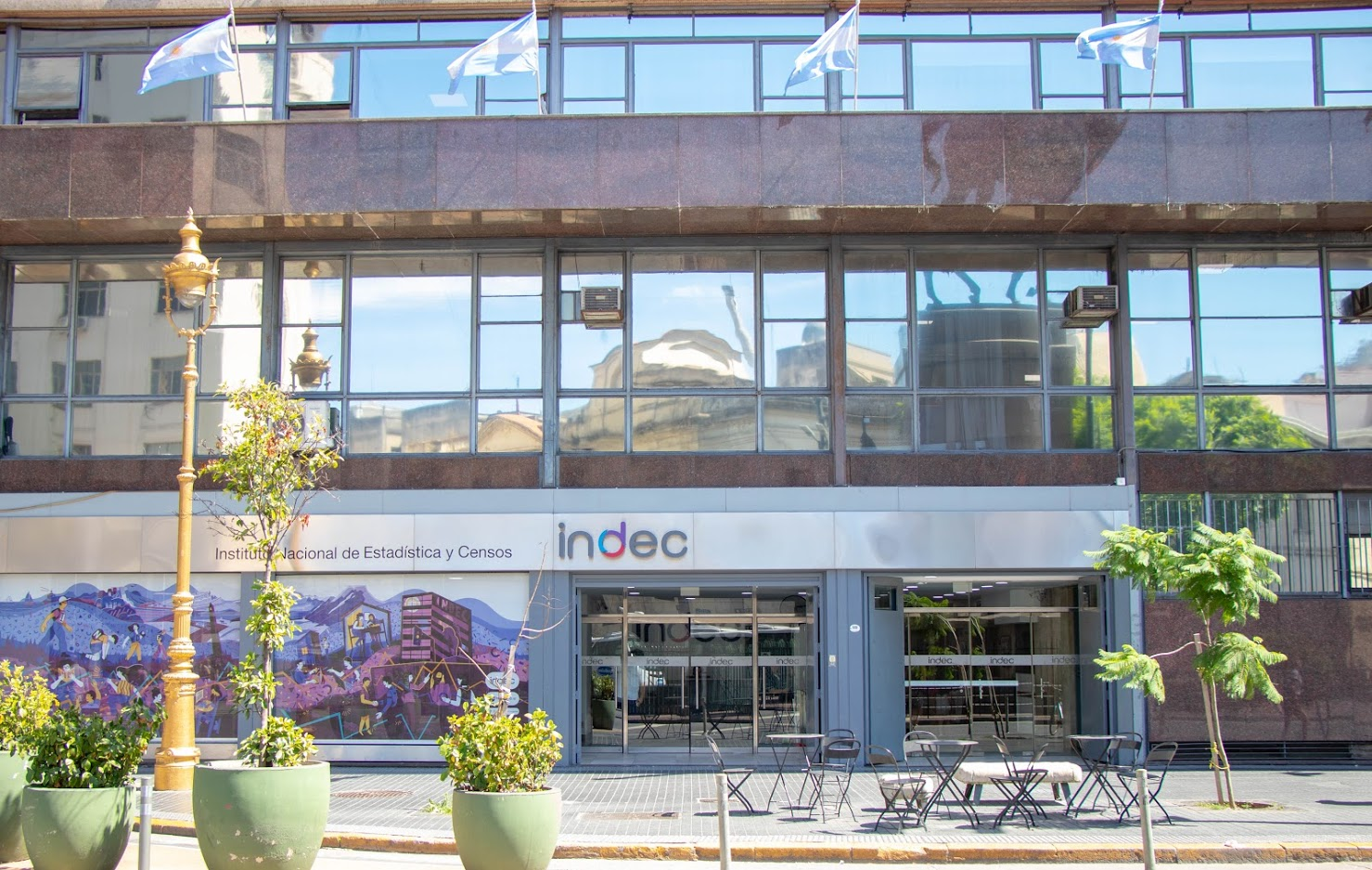 El Instituto Nacional de Estadística y Censos (INDEC) es un organismo público desconcentrado de carácter técnico, dentro de la órbita del Ministerio de Hacienda de la Nación, que ejerce la dirección superior de todas las actividades estadísticas oficiales que se realizan en la República Argentina.